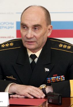 Главнокомандующий ВМФ России адмирал Владимир Высоцкий